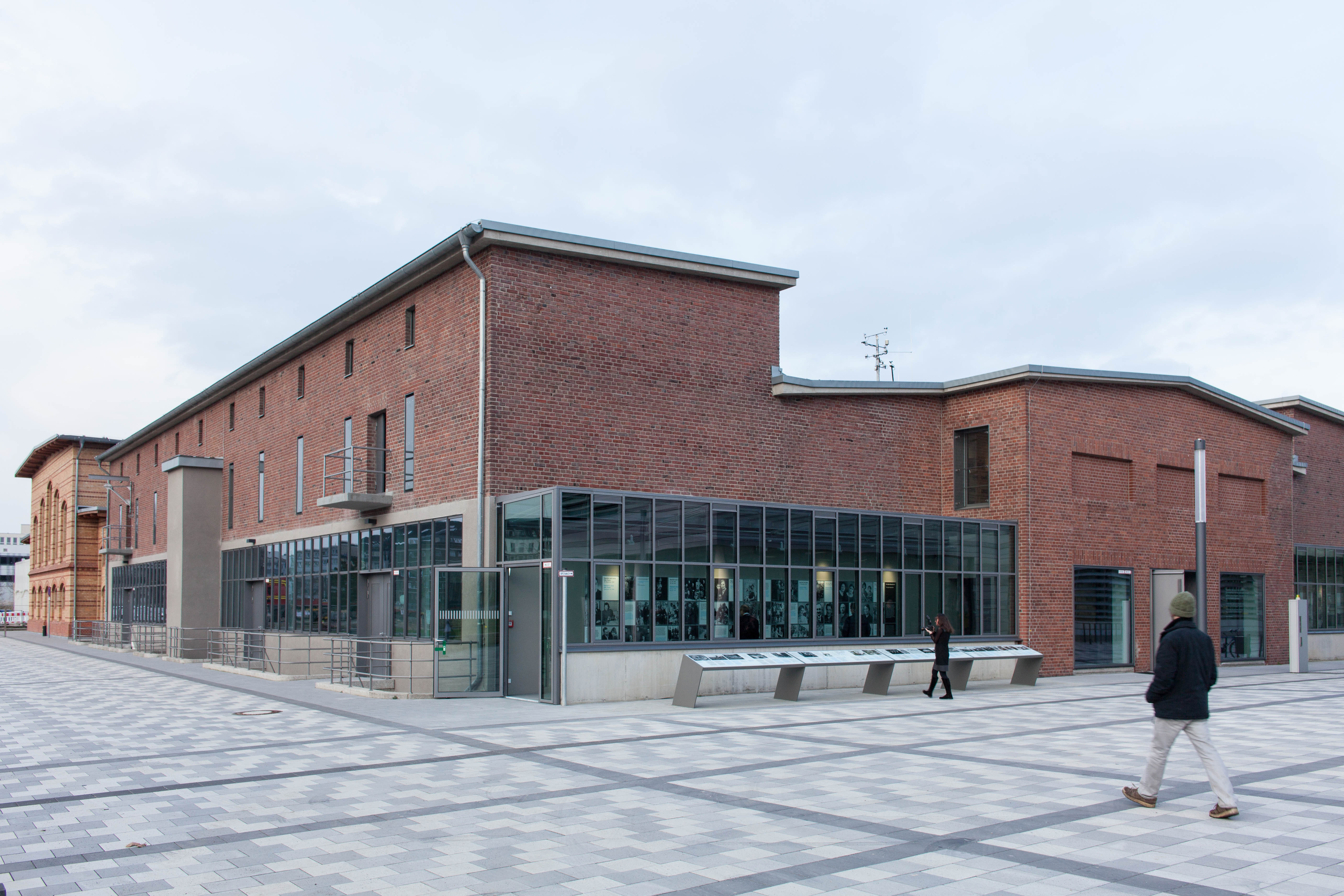 Das restaurierte Gebäude des Alten Schlachthofes Düsseldorf